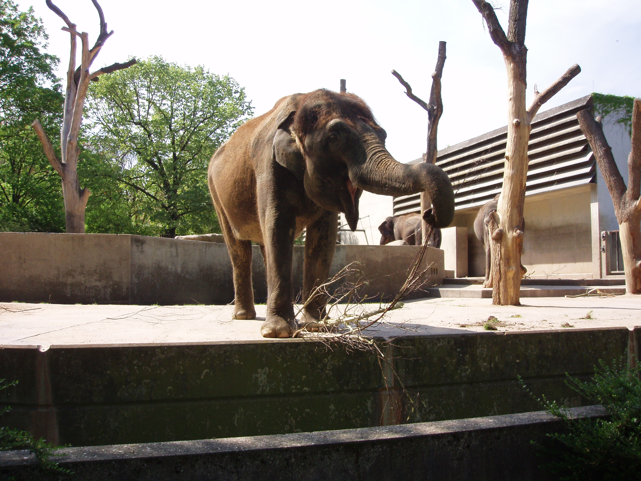 Elefantenanlage